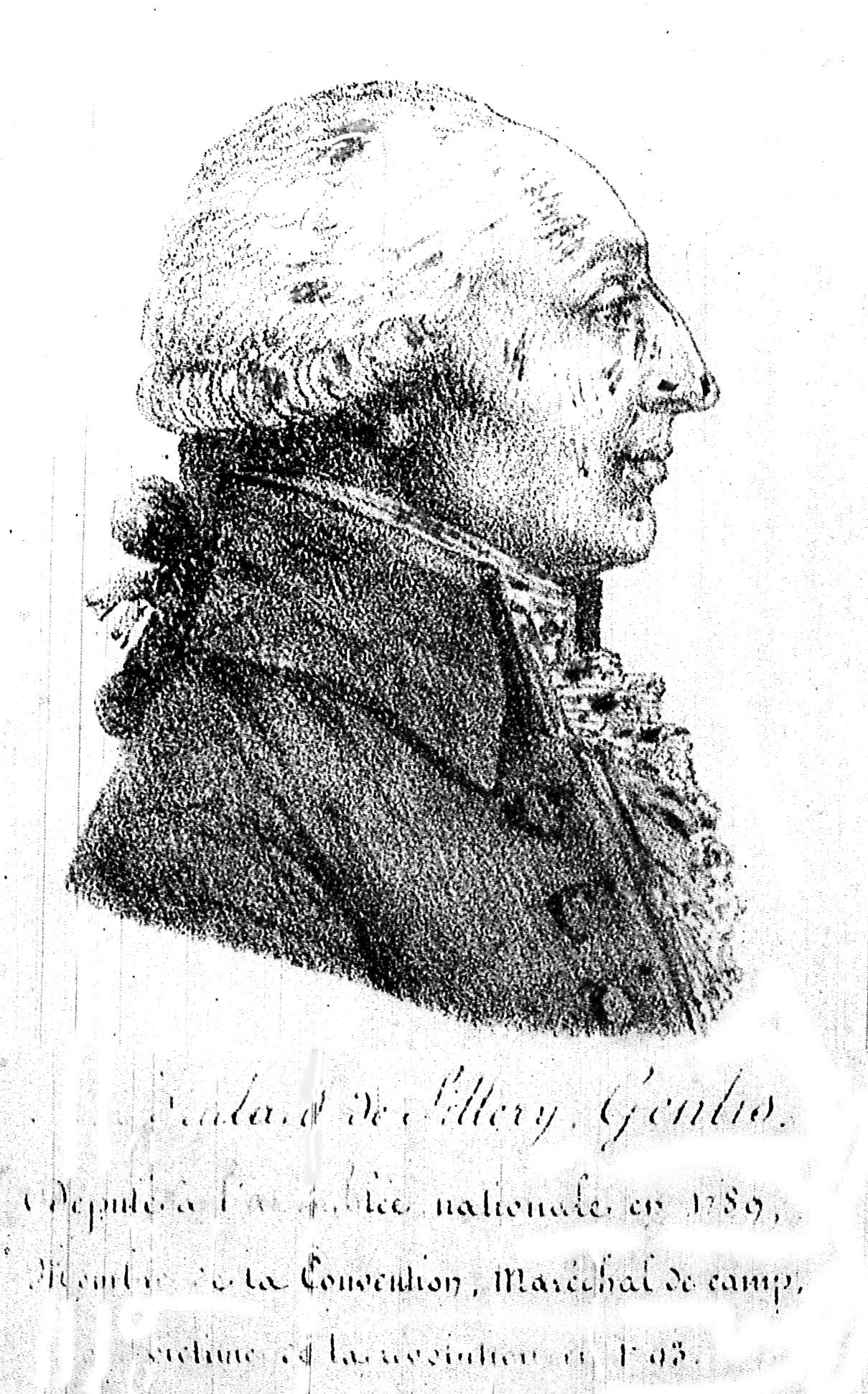 issu de la bibliothèque de reims.